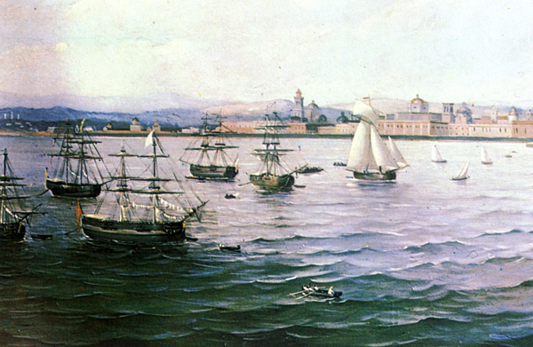 óleo por Eduardo Pringuet. Imagen tomada de la revista Artes de México, núm. 116, año XV, 1969, sin página.